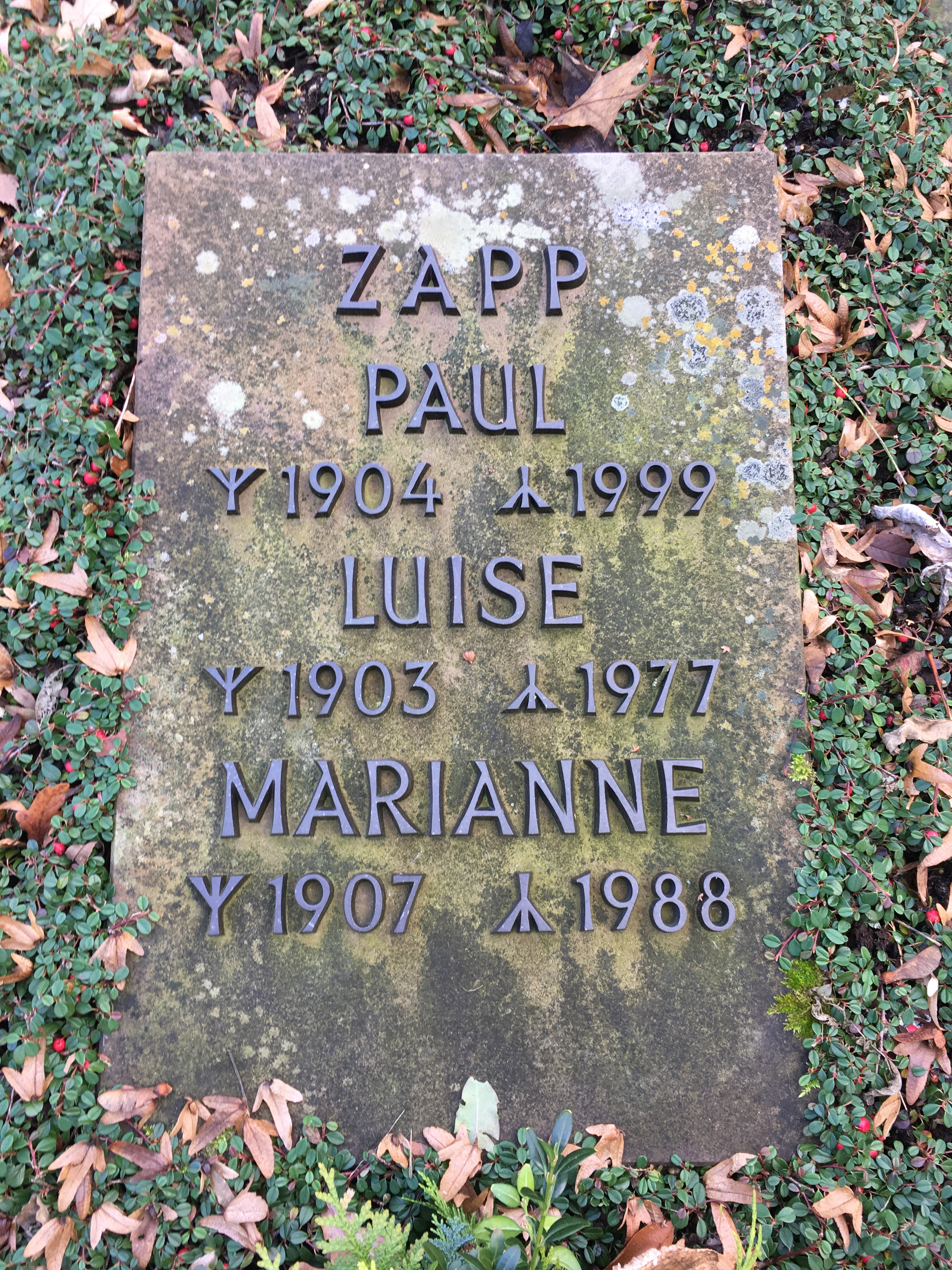 Grabstelle Paul Zapp, Niederaula